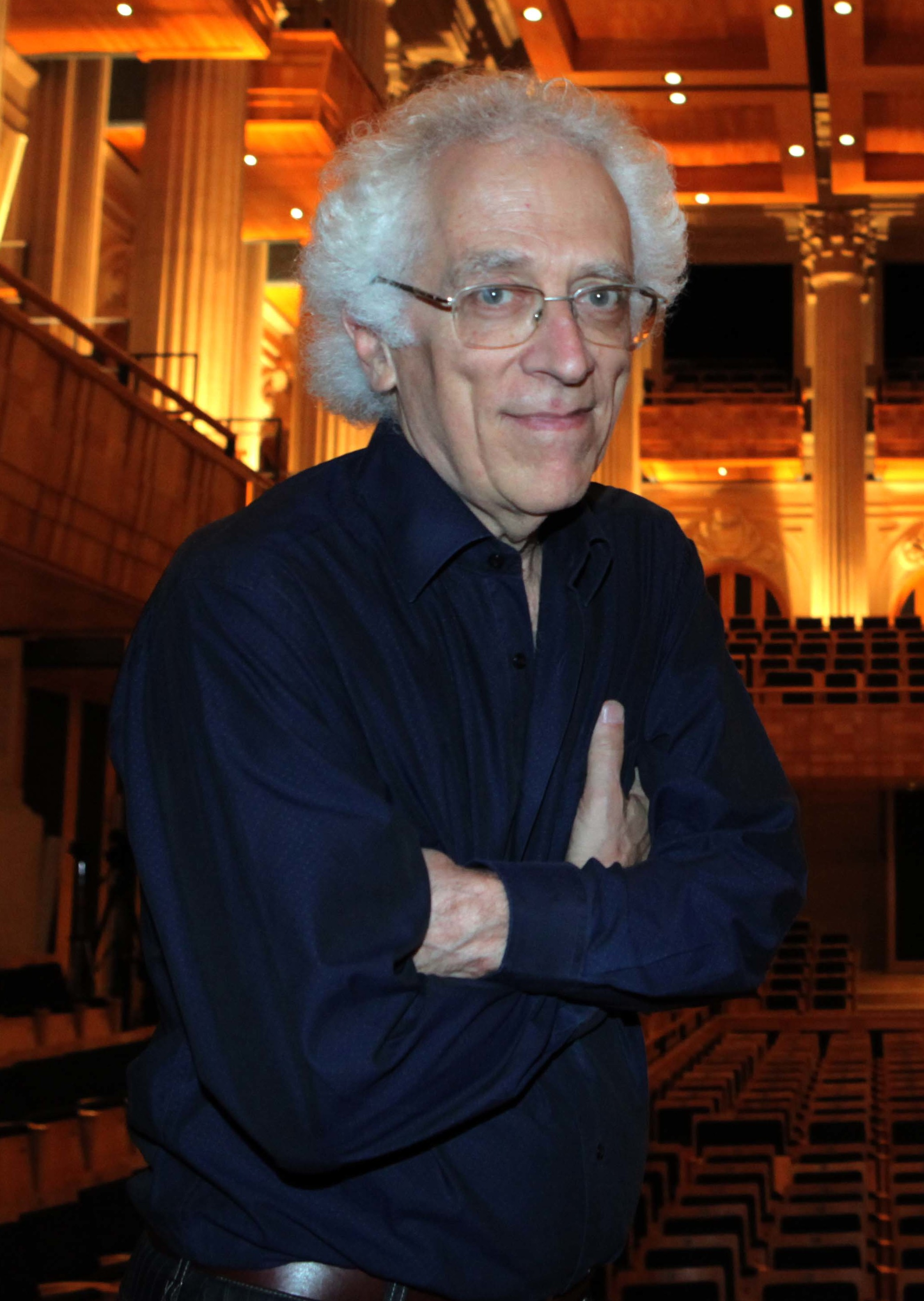 Tzvetan Todorov no Fronteiras do Pensamento São Paulo 2012